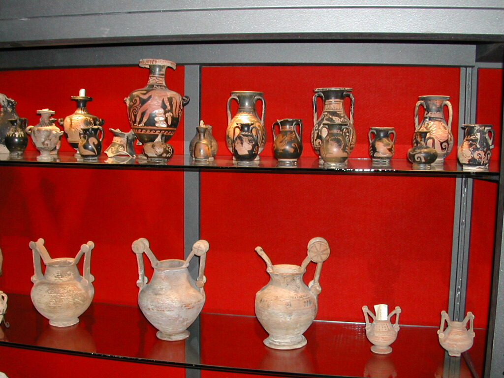 reperti archeologici esposti nella cripta della Cattedrale di Monopoli